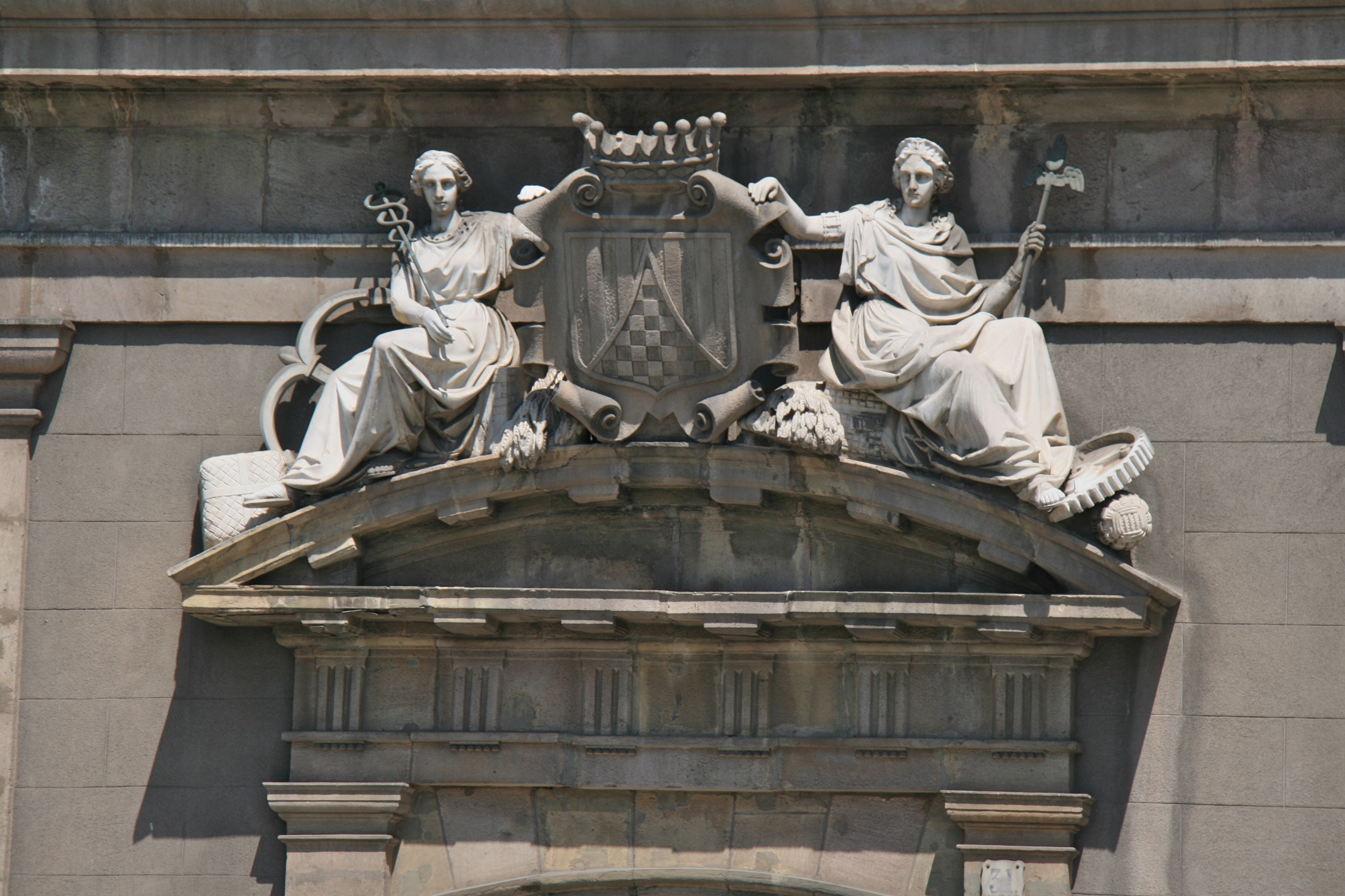 Portada del Banco de Barcelona (alegorías del comercio y la industria)